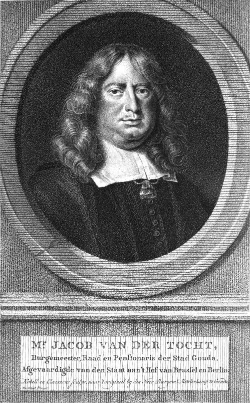 Portret (gravure) van Jacob van der Tocht († 1680), burgemeester van Gouda